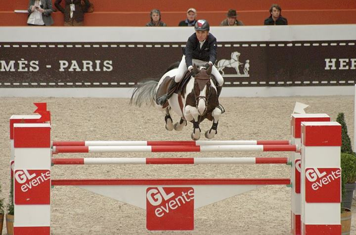 Michel Robert et Catapulte, lors de l'édition 2012 du Saut Hermès, à Paris.